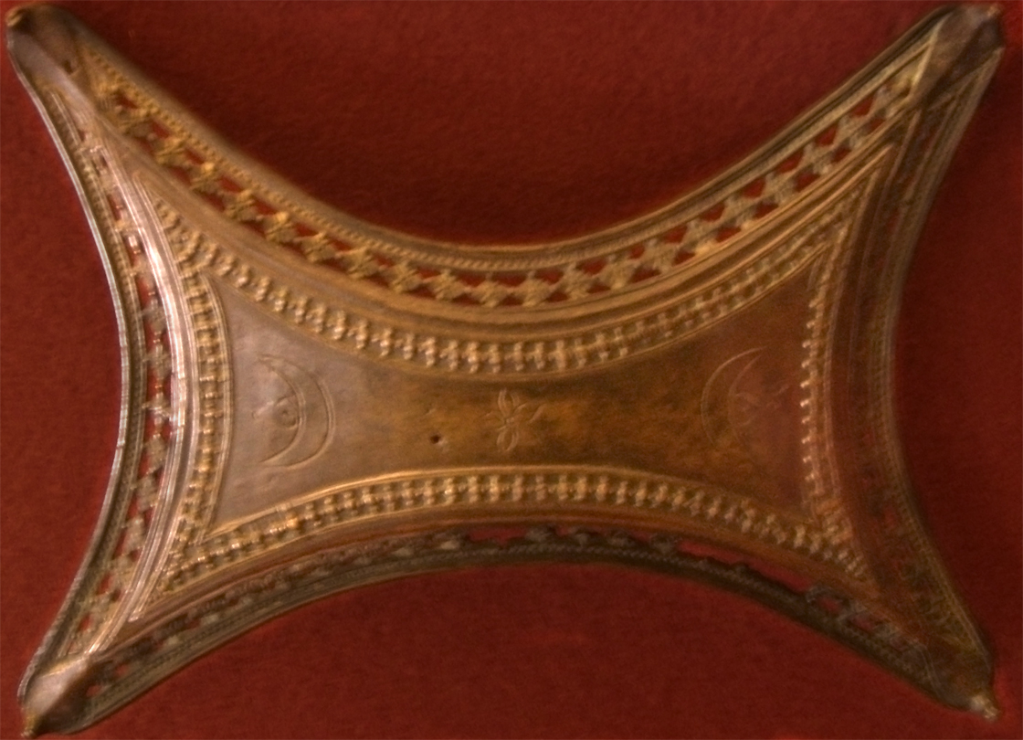 Фехтовальный щиток "Боче", начало XVI в. Эрмитаж, Санкт-Петербург.